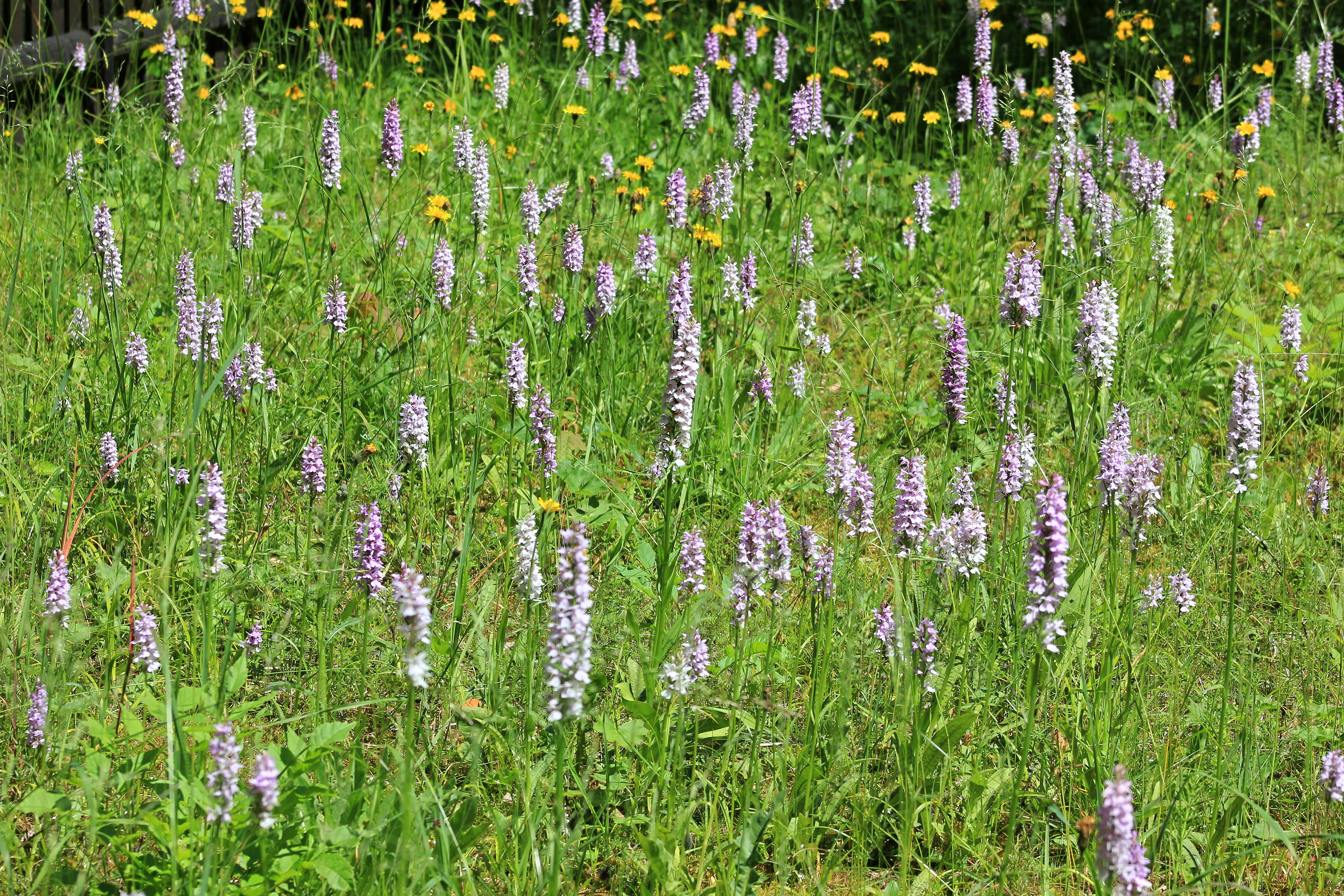 Orchideenwiese (überwiegend Knabenkräuter (Dactylorhiza)) im Flora-Fauna-Habitat Kalkwerk Lengefeld. Pockau (OT Lengefeld), Erzgebirge.